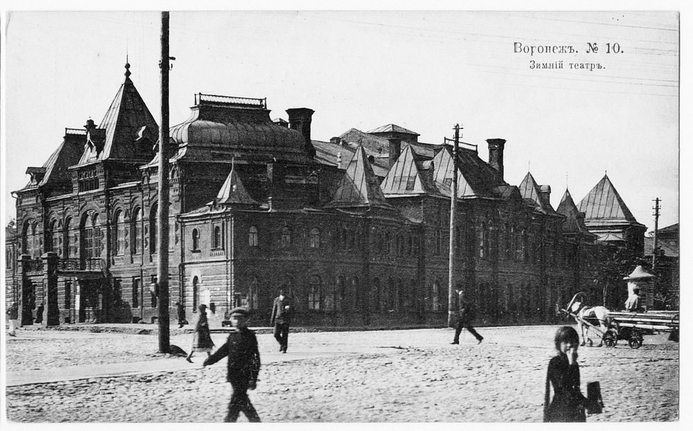 Зимний городской театр